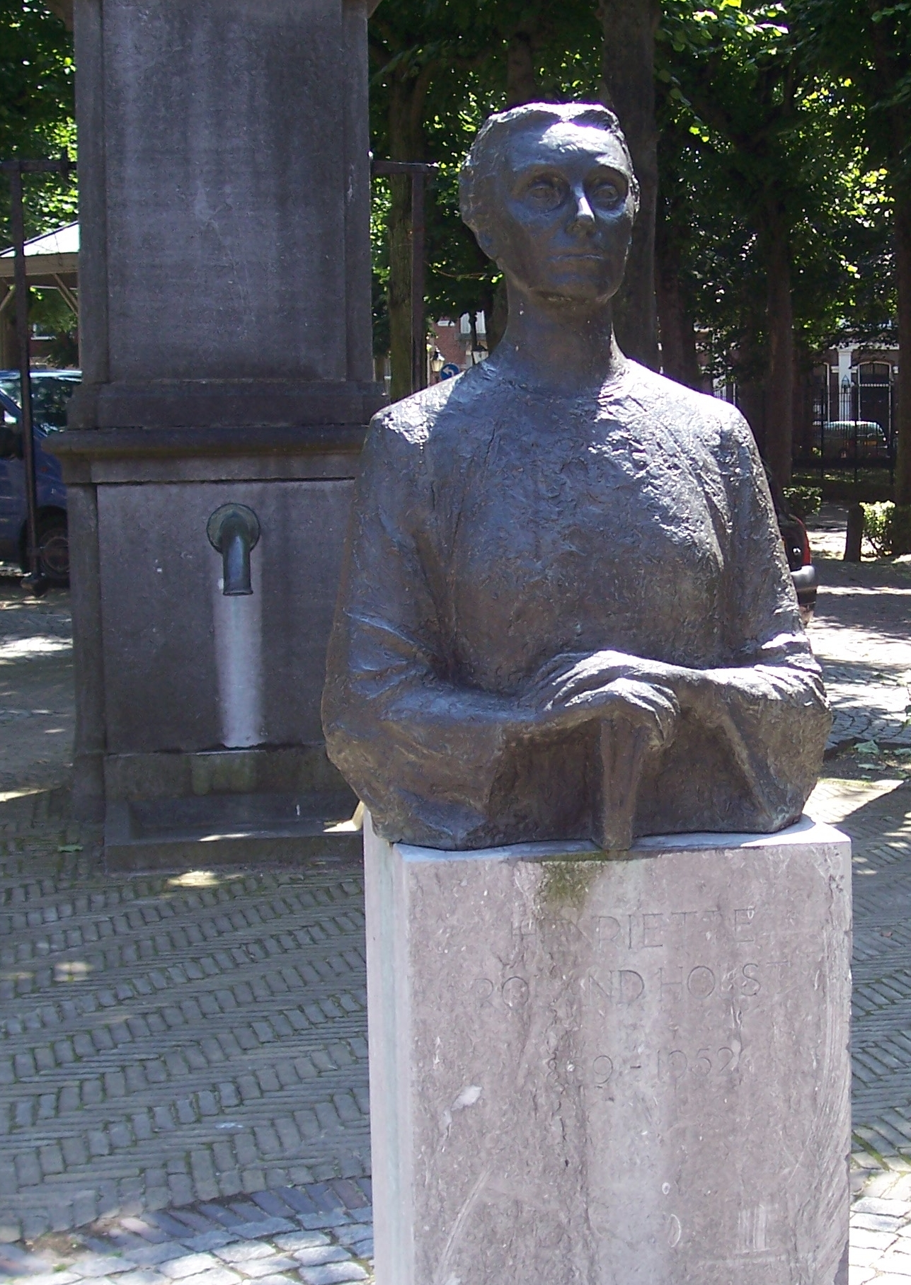 Henriëtte Roland Holst, Lindenplein Noordwijk